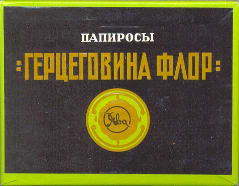 папиросы